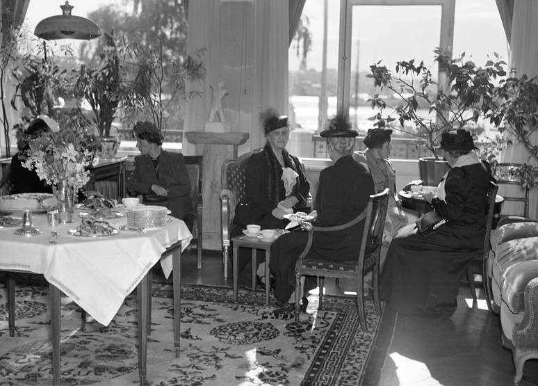 Waldemarsudde, terrassrummet. Föreningen Konstnärernas vänner har årsmöte.